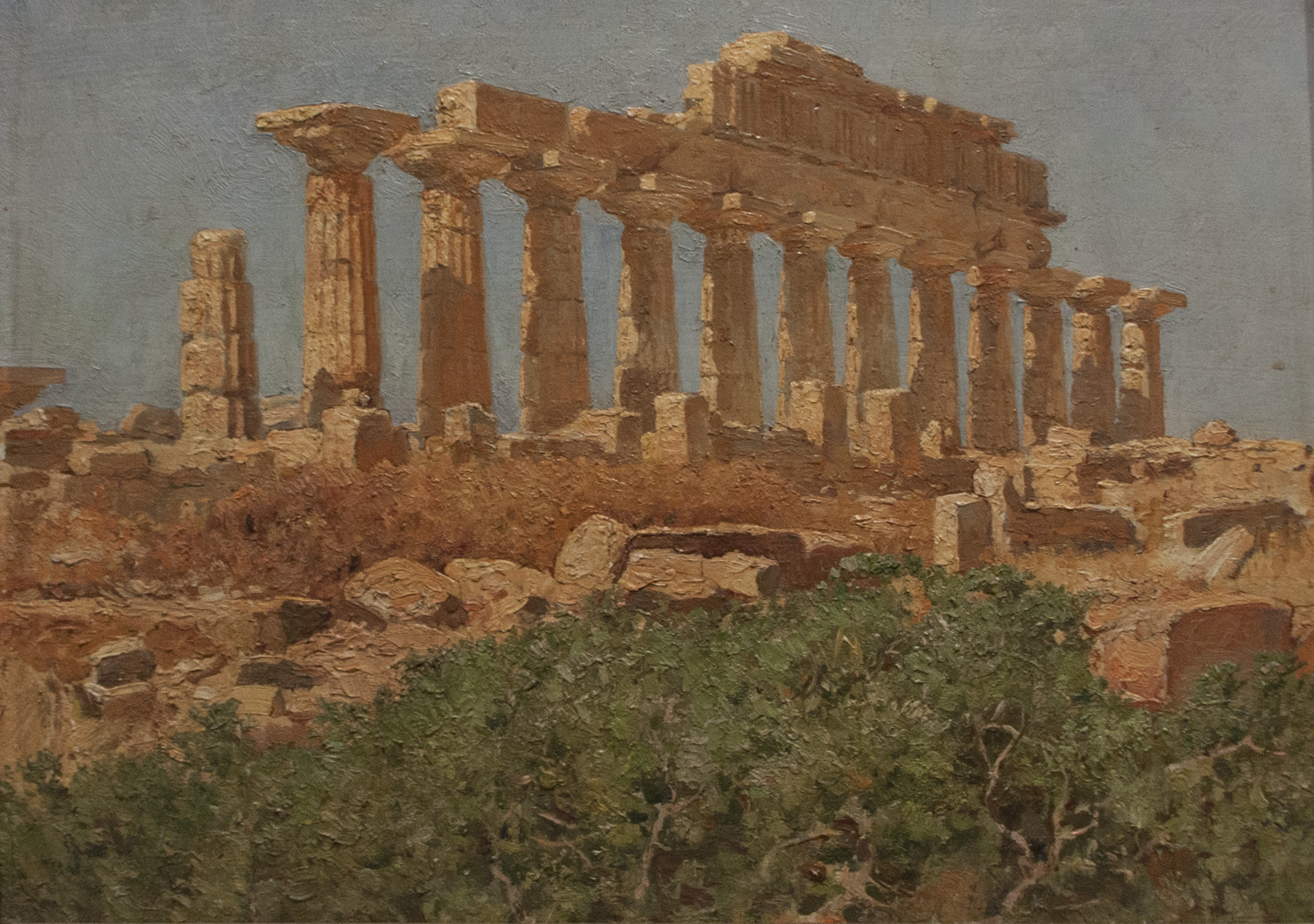 Le colonne rialzate del tempio C di Selinunte - Gennaro Pardo olio su tela 1927